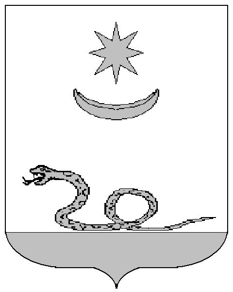 Grb obitelji Tiščić